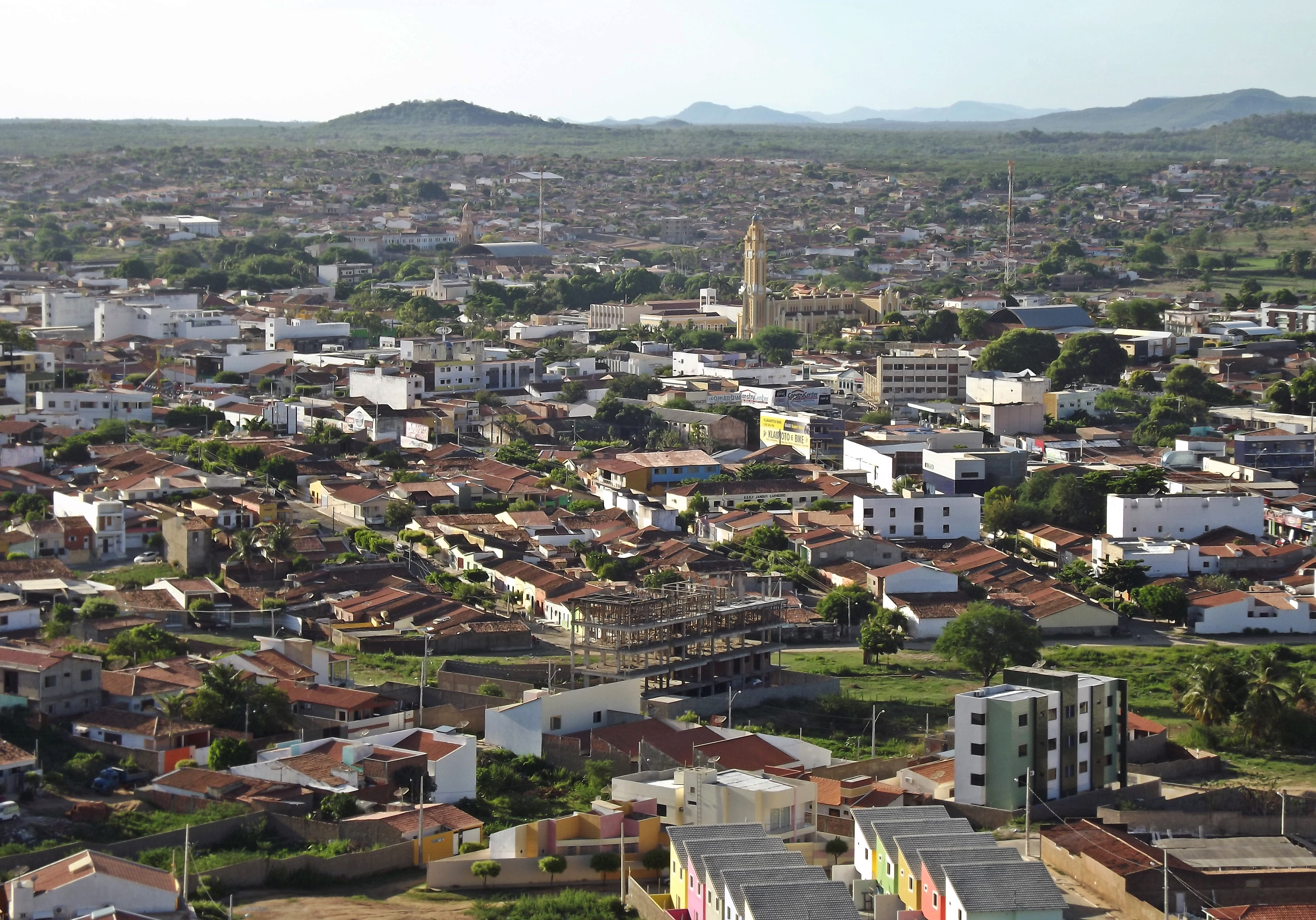 Vista panorâmica de Cajazeiras, estado da Paraíba, Brasil.